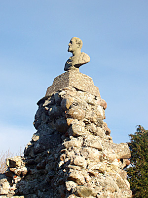 Ruin af Kysing Kirke Norsminde, Hads Herred, Århus Amt, Denmark